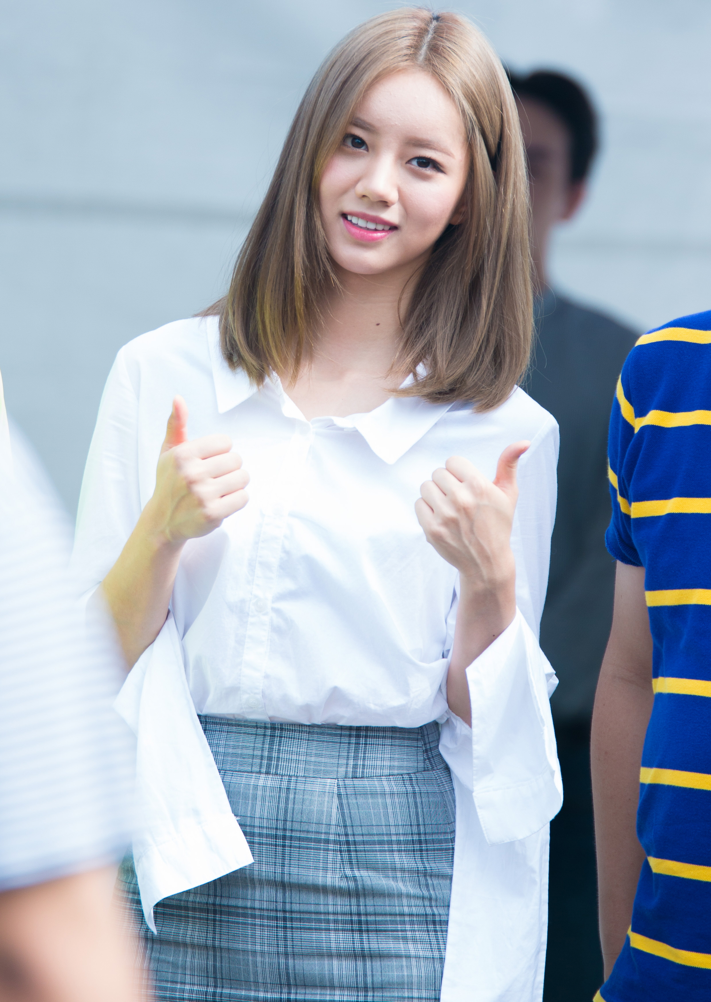 20160910 걸스데이 혜리 세븐일레븐 도시락 팬사인회